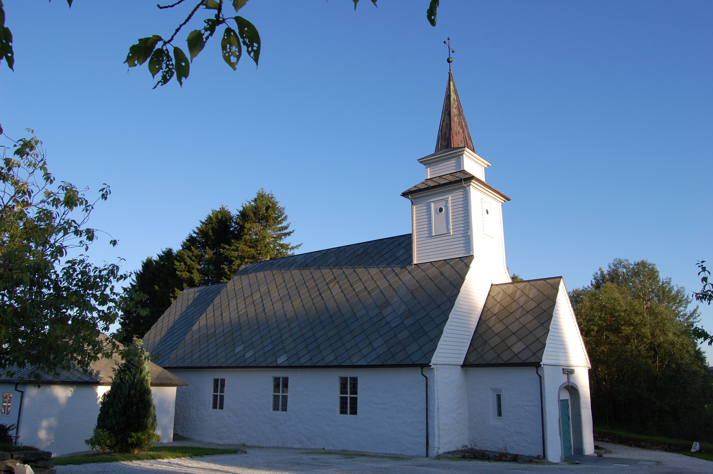 Åsane gamle kirke.